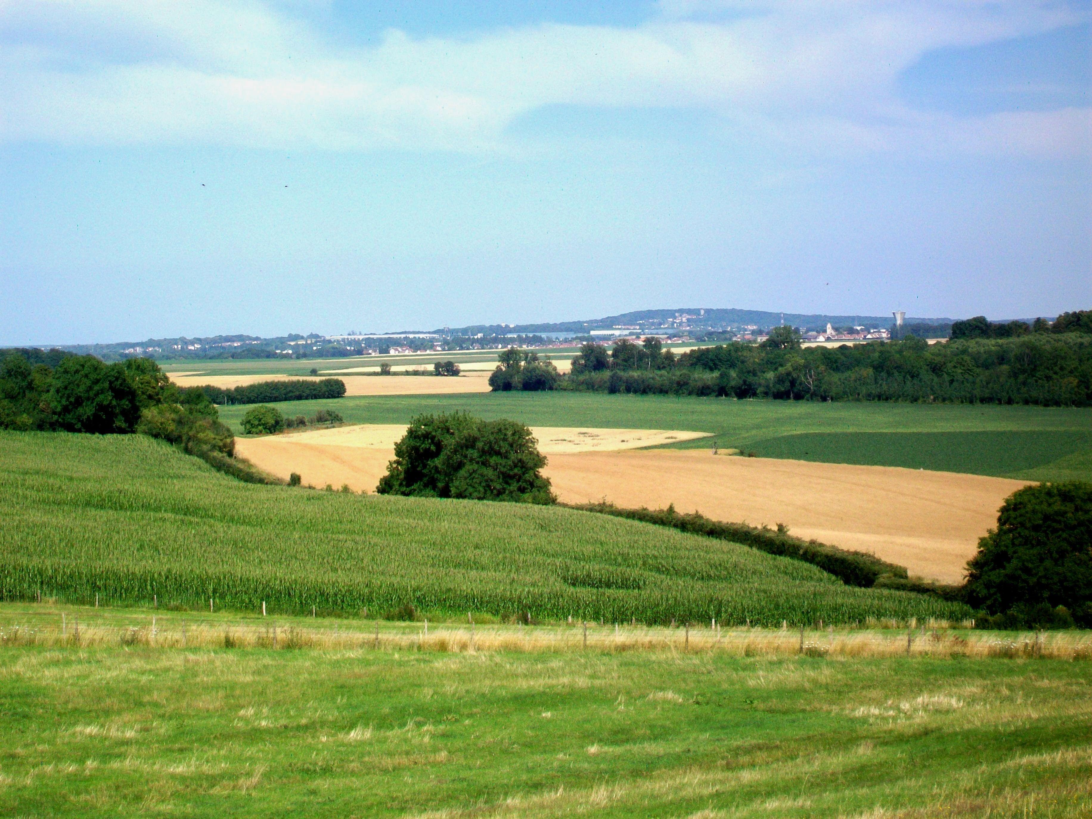 La butte-témoin sur laquelle a été construit le village permet de bénéficier de belles vues sur les environs ; ici, en direction de l'est vers la butte de Montmélian.